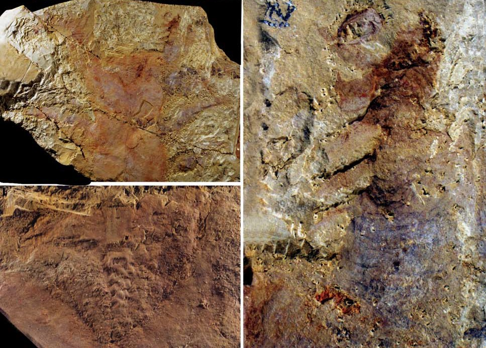 Lower Cambrian xenusiid lobopod Jianshanopodia decora gen. et sp. nov., from Haikou, Kunming, Yunnan, China. B. Specimen ELI−J0001; B1, anterior part of Jianshanopodia decora; B2, enlargement of the right frontal appendage showing the five cuneiform plates and the most anterior frontal plate with a probable captured victim (indicated by an arrow), a small bradoriid; B3, enlargement of the pharynx.